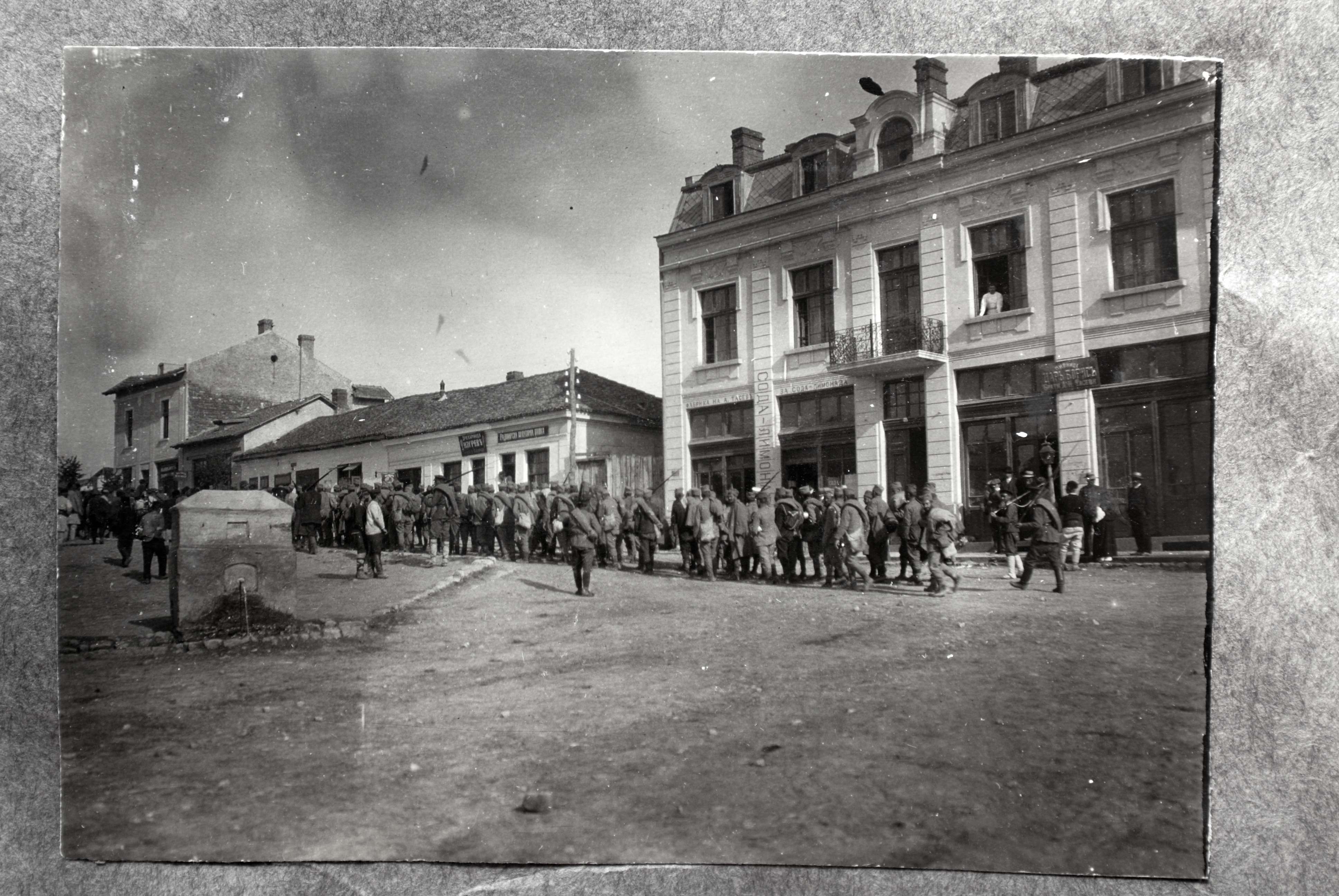 Българската армия в Радомир, юни 1913 г.